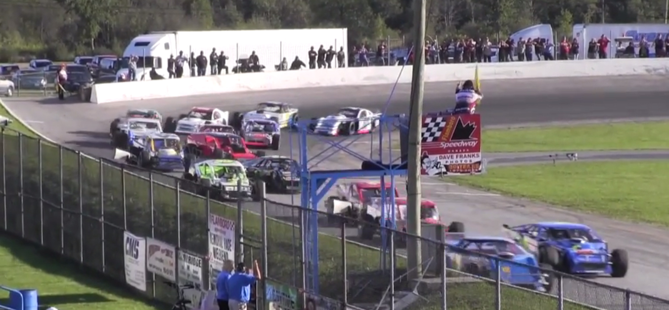 Flamboro Speedway